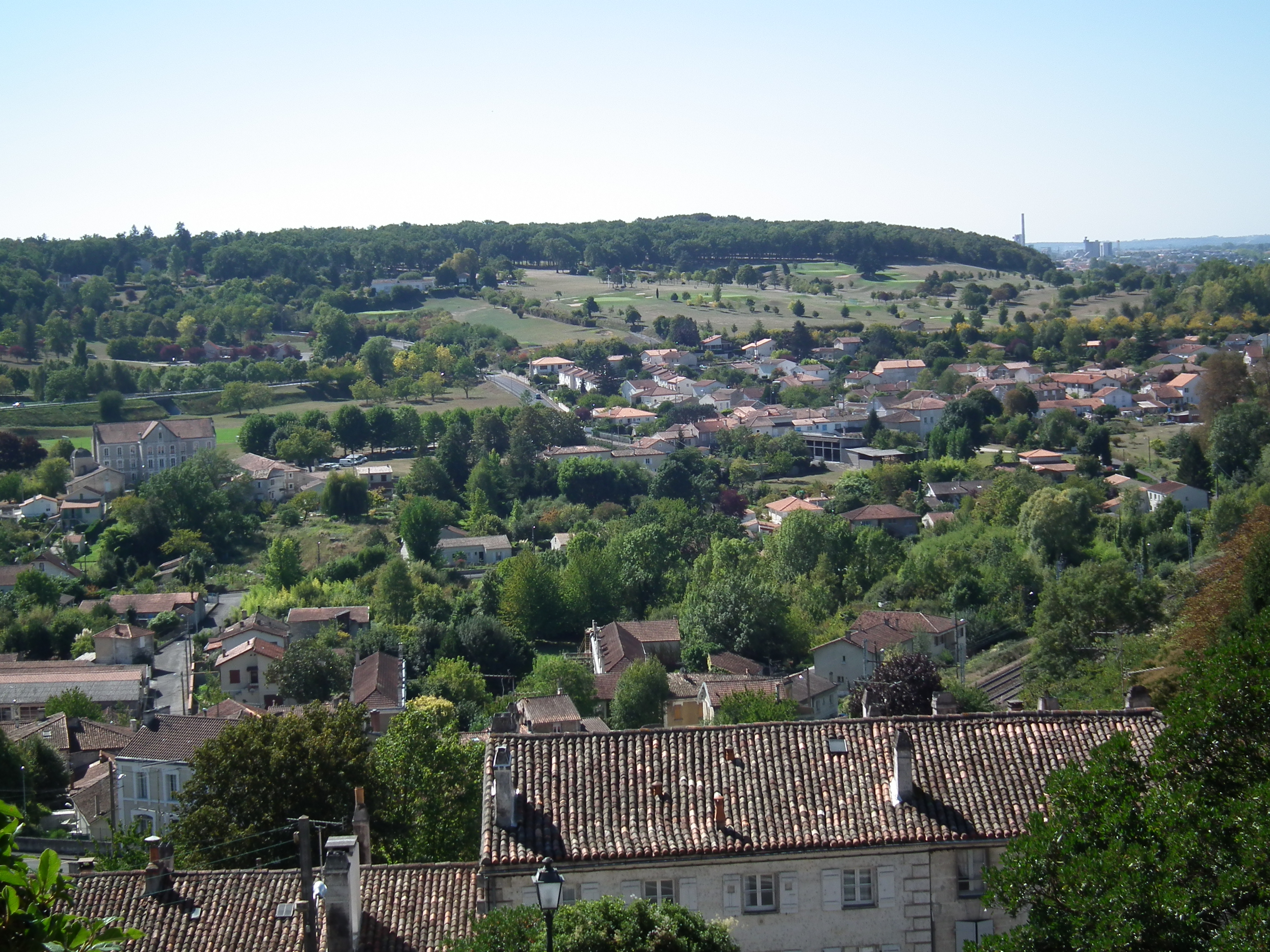 Vue des quartiers sud d'Angoulême